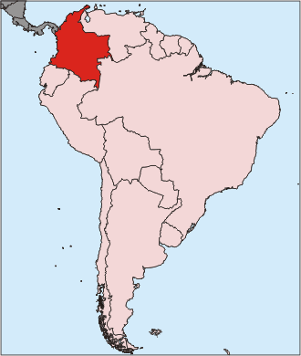 Lage von Kolumbien in Suedamerika